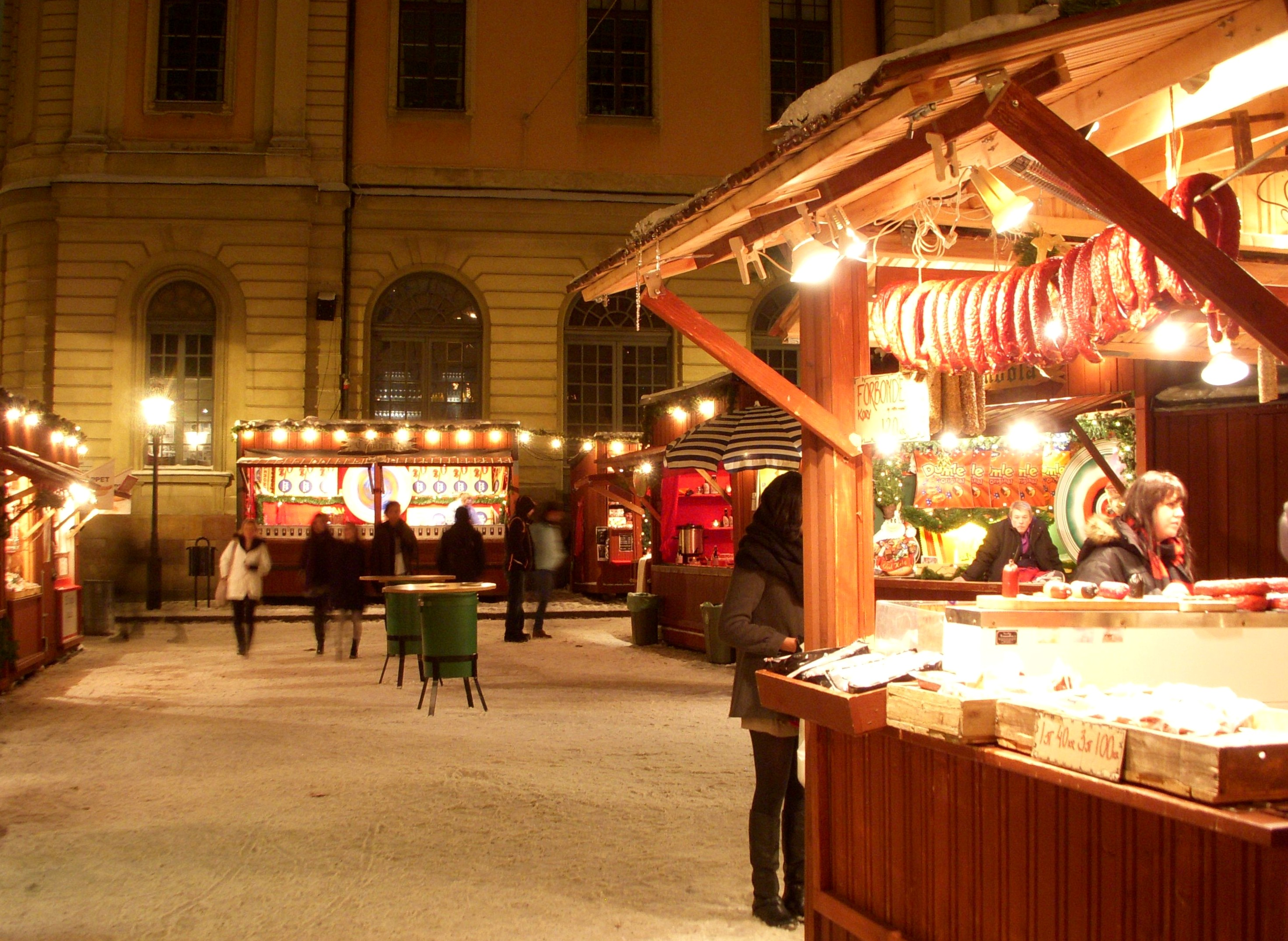 Julmarknad i Gamla stan